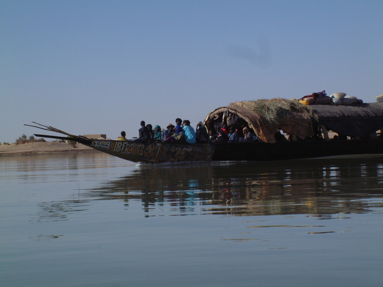 Auteur: Taguelmoust Pinasse collective sur le Niger près de Mopti, au Mali. GFDL Taguelmoust janvier 2003